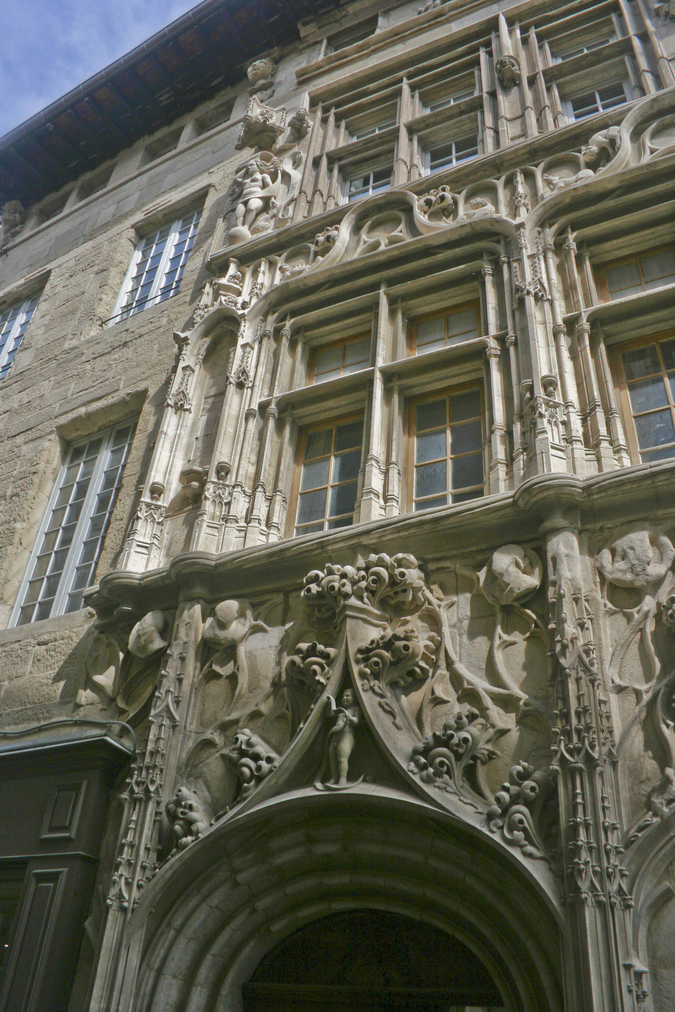 Façade de la Maison des Têtes (détail) à Valence (Drôme, France)